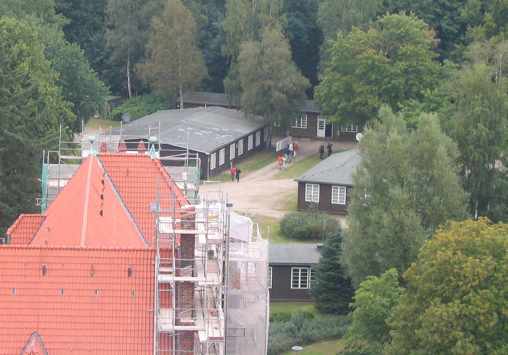 Das noch vollständige Trampedachlager (Flensburg-Mürwik 2005), Bild 02